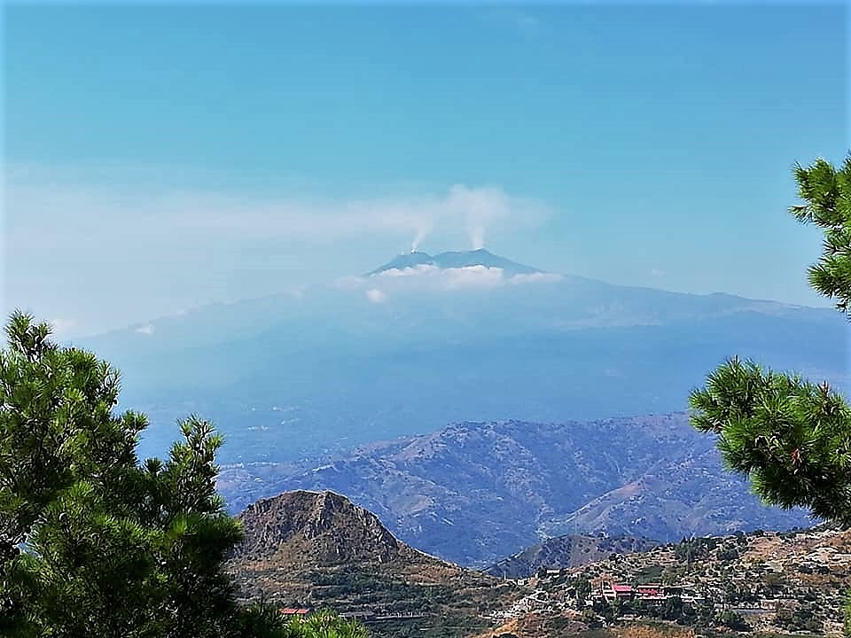 Panorama sull'Etna e le tre bocche effusive.